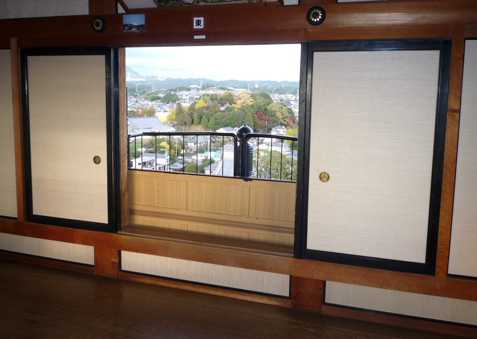 掛川城の復興天守の最上階の襖には歴史的に掛川地域で使われてきた葛布が利用されている